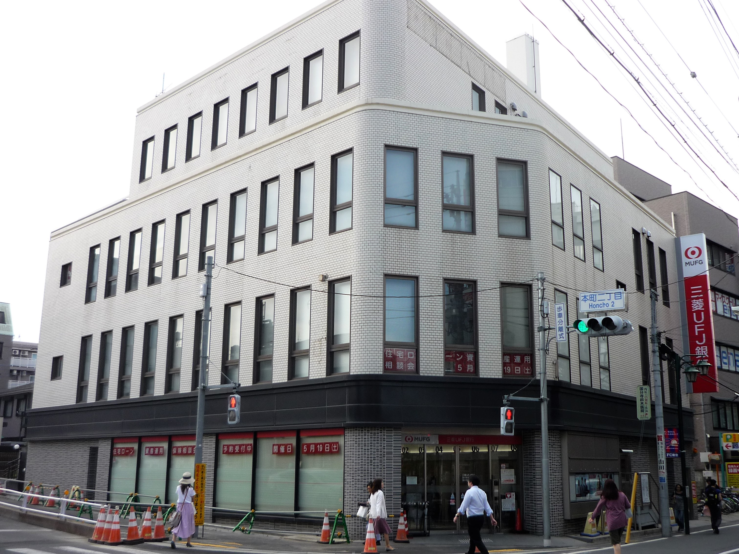 三菱UFJ銀行 国分寺支店・国分寺駅前支店（国分寺市本町）